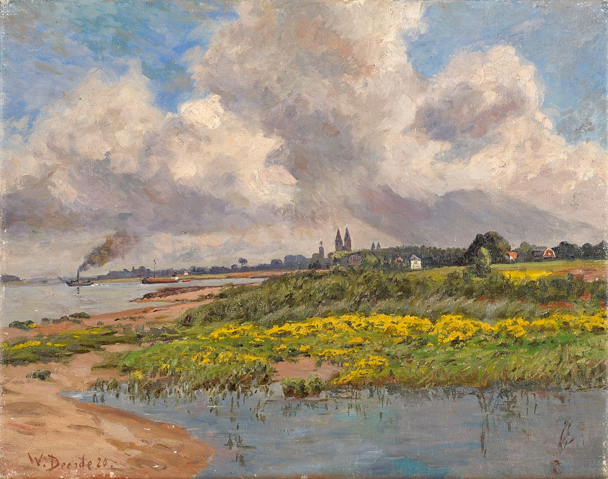 Sommertag in Kaiserswerth. Signiert. Datiert (19) 20. Öl/Lwd., 40 x 50 cm